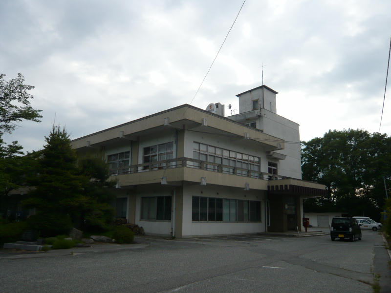 泰阜村役場